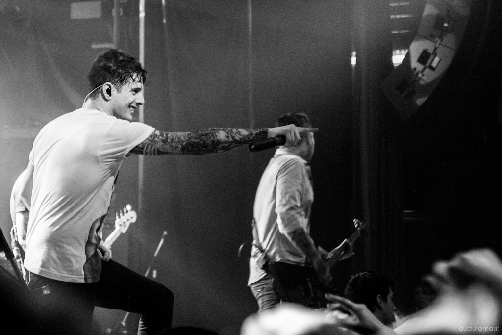 Show Deny 5 Años - La Trastienda